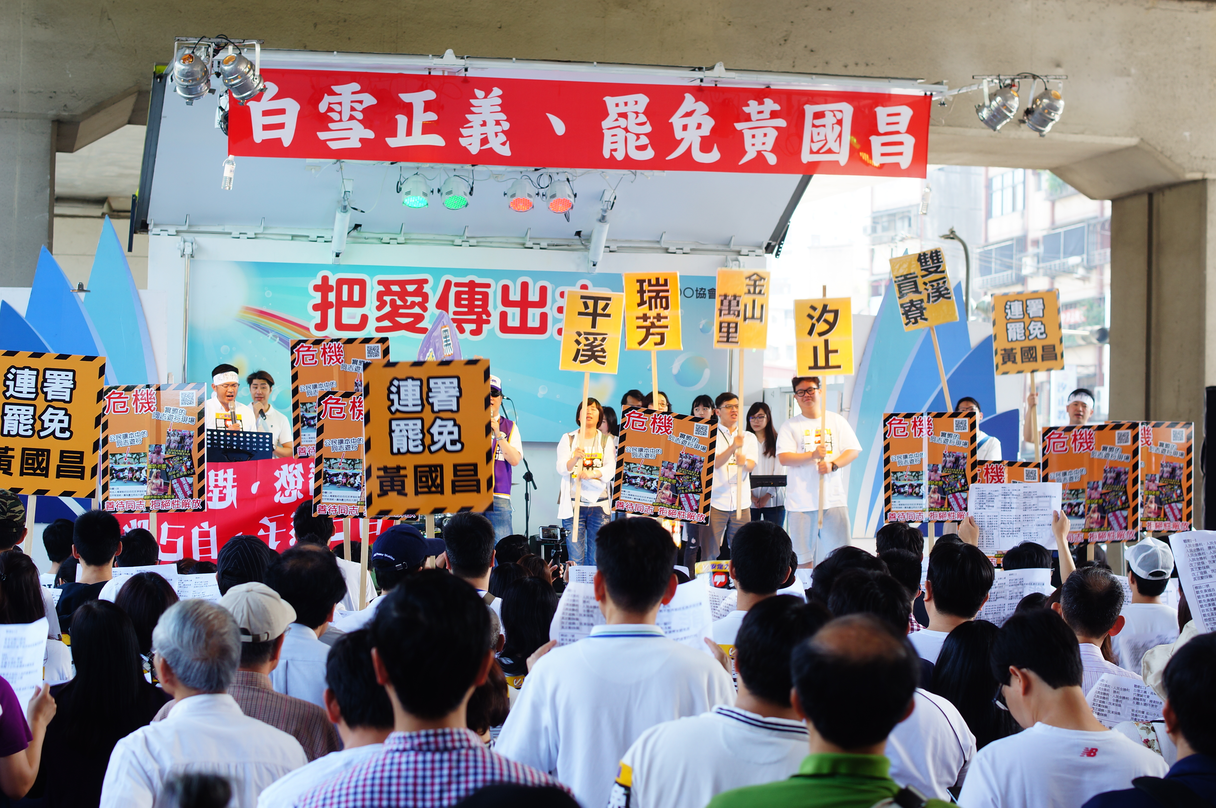 安定力量聯盟於臺灣鐵路管理局汐止車站信義路廣場舉辦罷免黃國昌造勢活動。